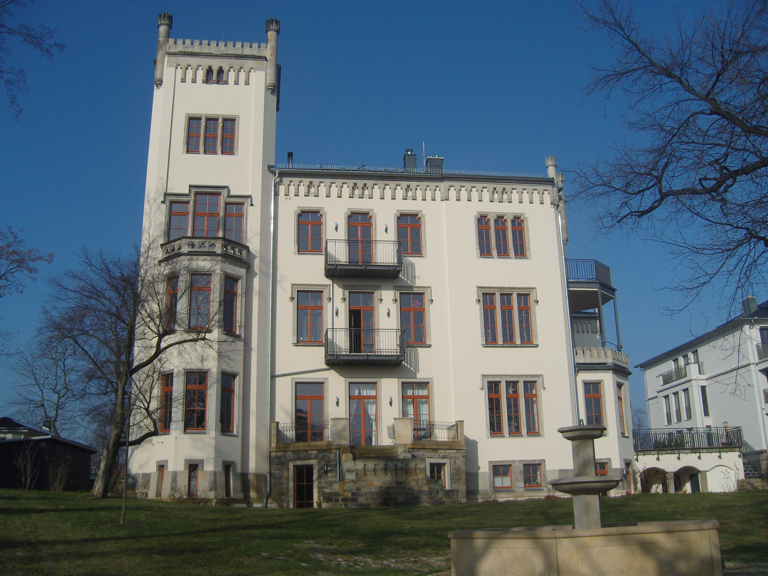 Haus Bautzner Straße 82 in Dresden, Rückansicht von der Elbe